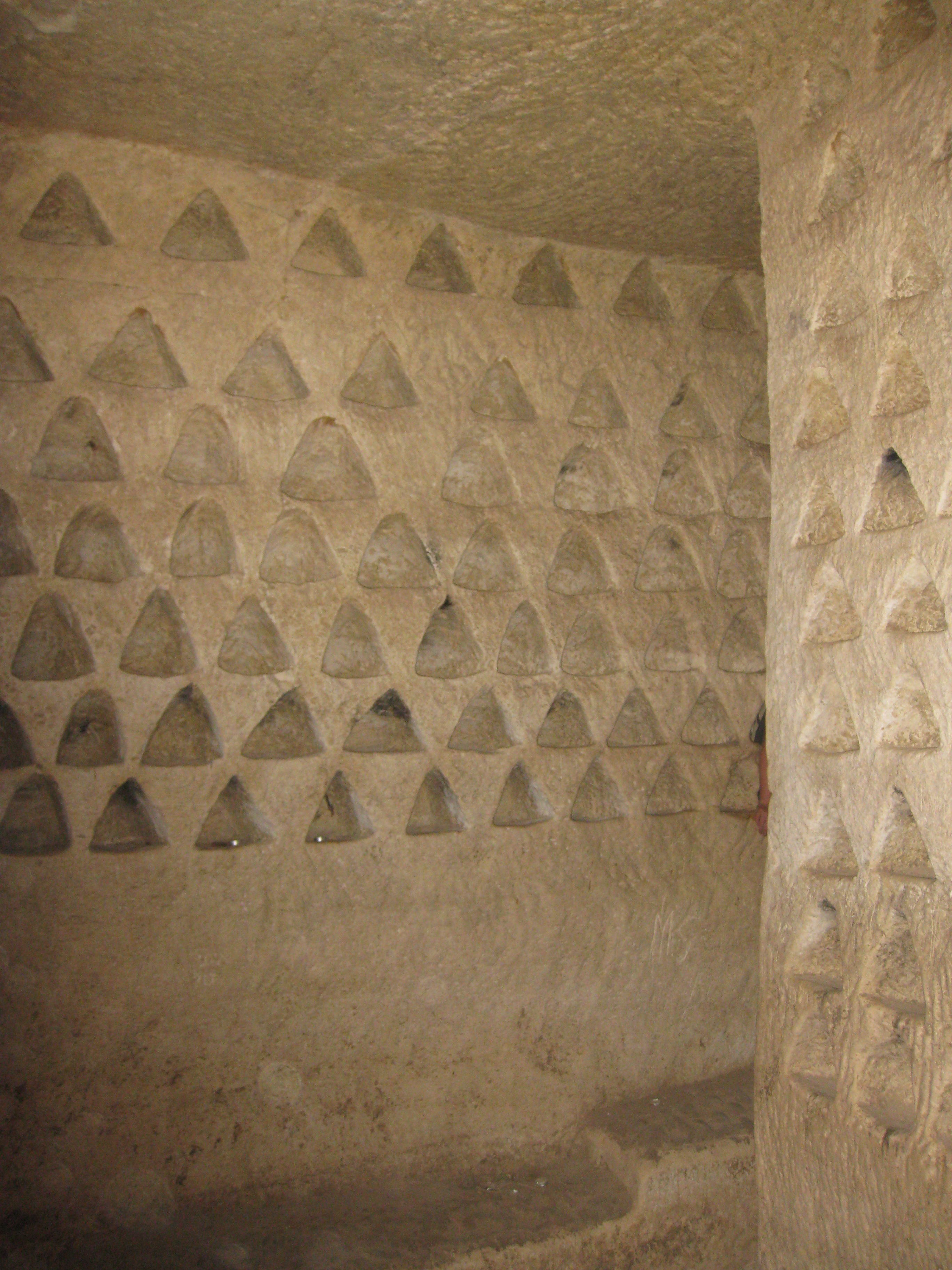 Tel Goded - The Columbarium Cave תל גודד - מערת הקולומבריום